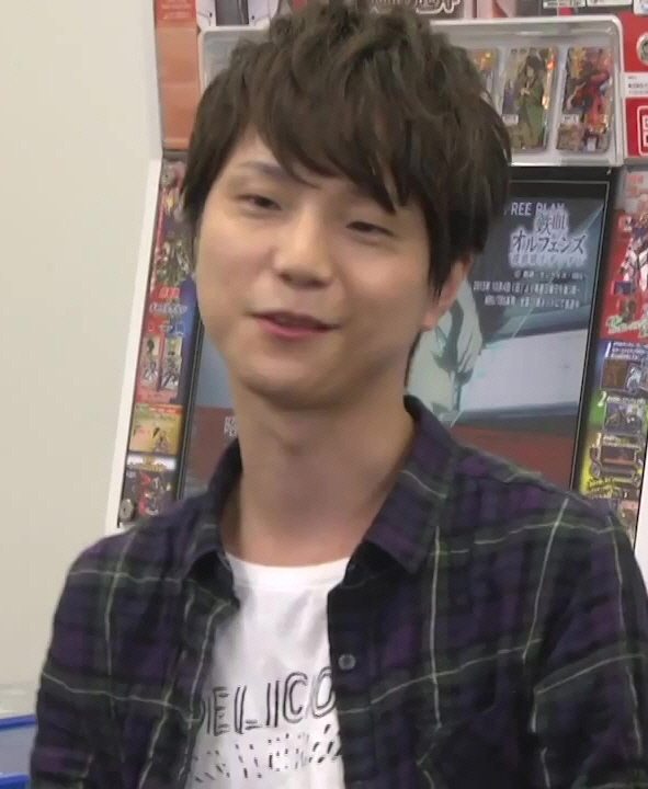 ガンダムトライエイジ プレイムービー特別版 PART3